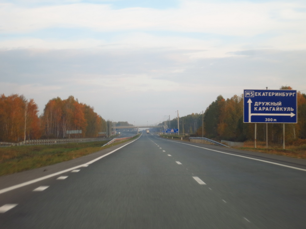 Федеральная автодорога М5 "Урал" участок Челябинск - Екатеринбург ("подъезд к Екатеринбургу")